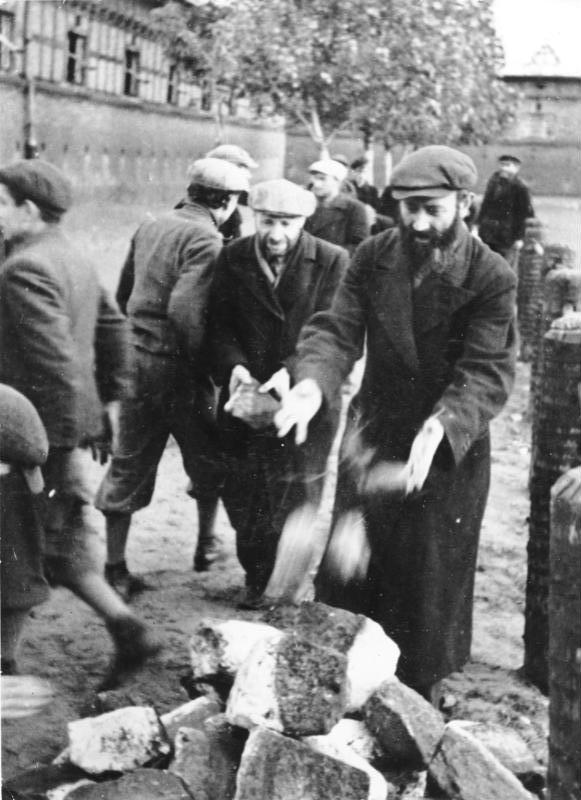 Polen, Bromberg, Juden bei Zwangsarbeit Unter der Naziherrschaft wurden die Juden zwangsweise zu schwerer körperlicher Arbeit herangezogen. Faschistisches Internierungslager für Juden in Bromberg (Bydgoszcz) Oktober 1939. Zentralbild